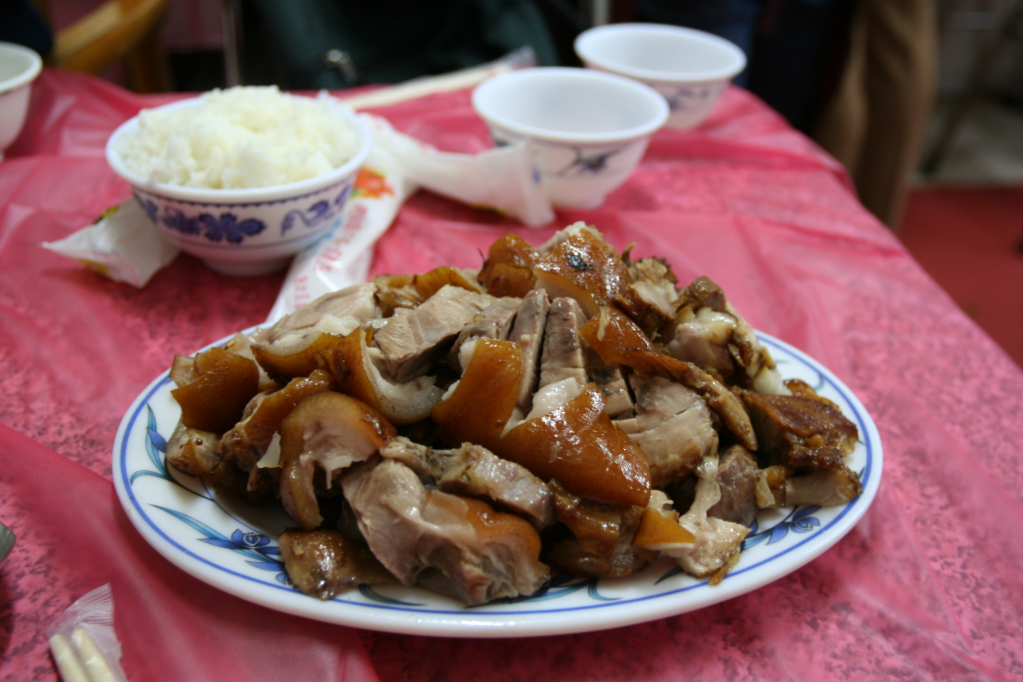 Bân-lâm-gú: Banban Tikha 中文（台灣）: 萬巒豬腳